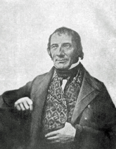 Johannes Kerkhoven (1783-1859)